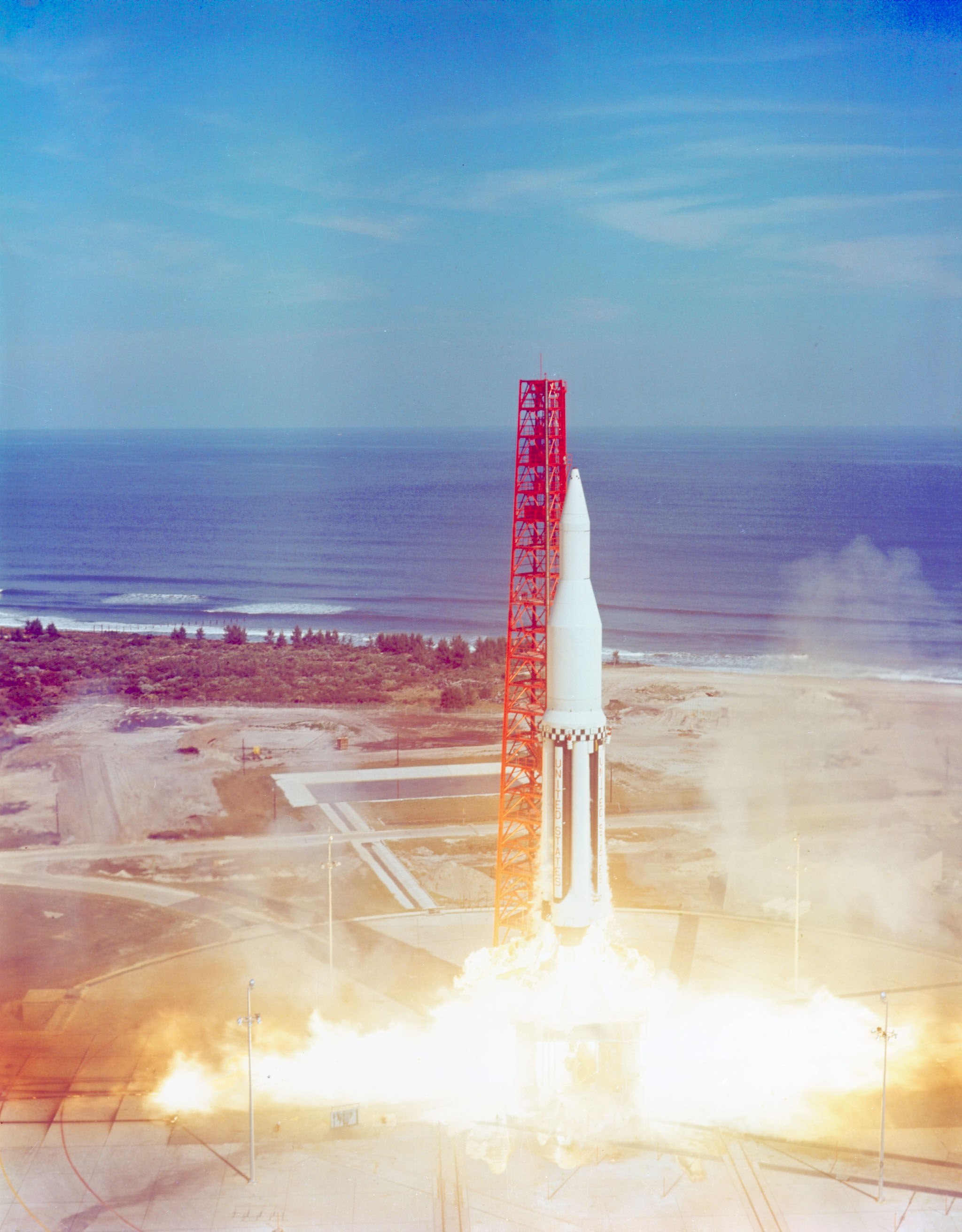 SATURN [SA-3] LIFTING OFF FROM LAUNCH COMPLEX 34.